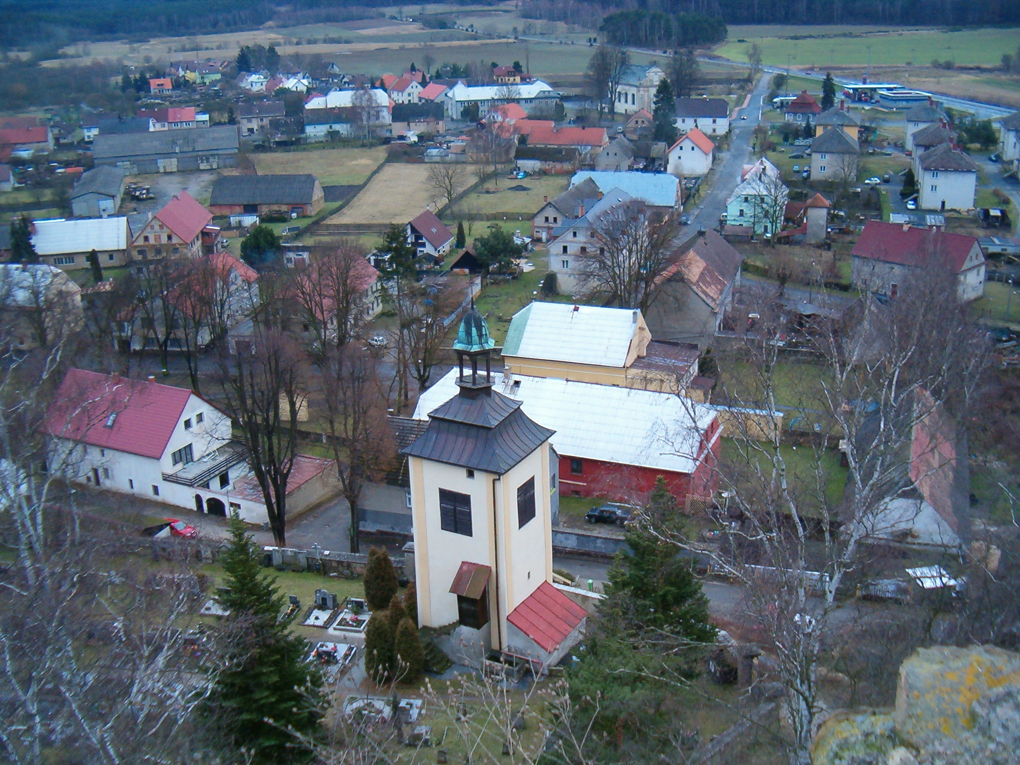 Pohled z hradu na obec Jestřebí. Hrad Jestřebí. Obec Jestřebí. Okres Česká Lípa. Česko.